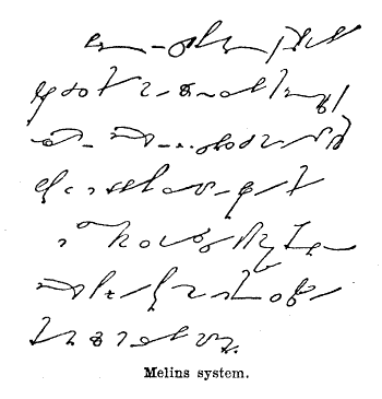 Example of the Melin shorthand system in Swedish. The plain text of the above text is as follows: Korthet och snabbskrifvenhet äro onekligen viktiga egenskaper hos stenografien, men af fullt ut lika stor betydelse är tillförlitligheten och tydligheten, och där den saknas, har man intet egentligt gagn för det praktiska lifvet af kunskapen i stenografi. Det system, som visar sig bäst motsvara anspråken på tydlighet, skall därför i längden komma att stå som segrare i striden mellan de olika metoderna.